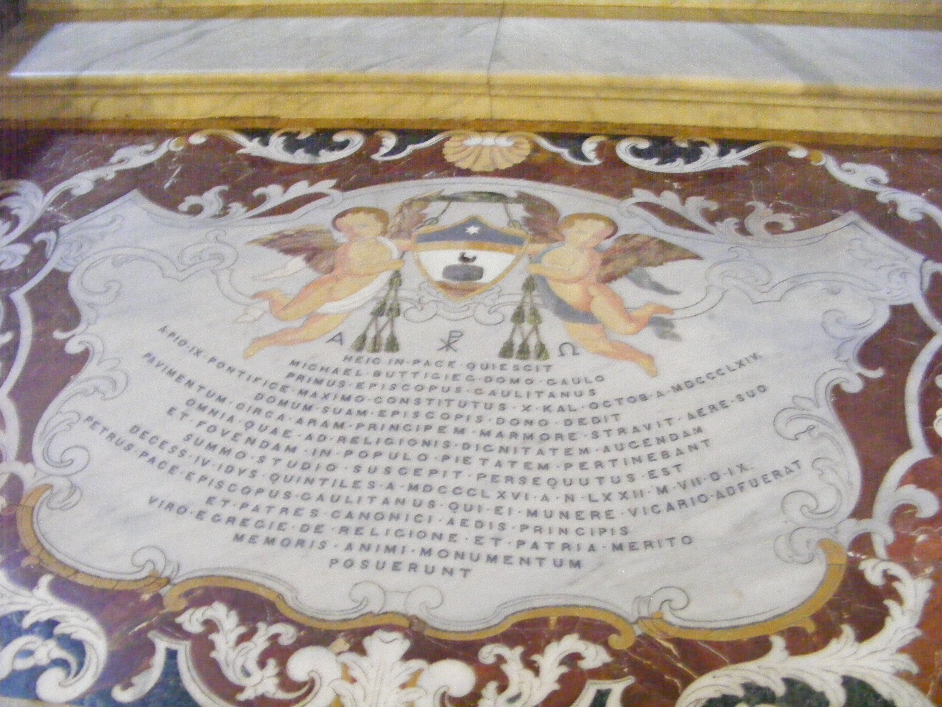 Kamień nagrobny pierwszego biskupa Gozo Michaela Buttigiega przed stopniem do prezbiterium katedry Wniebowzięcia na Gozo.